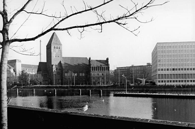 Berlin, Märkisches Museum, Spree ADN-ZB Zimmermann 27-2-73 Berlin: Vorbereitungen X.-Museen der Hauptstadt erwarten Gäste- Die Geschichte und Kultur der Stadt Berlin von den Anfängen bis zur Gegenwart lernt der Besucher im Märkischen Museum, einem der vielen Anziehungspunkte Berlins, kennen. Dieses kulturhistorische Museum begeht 1974 sein 100jähriges Jubiläum. Architektonisch vereint das Gebäude verschiedene Stilarten der ehemaligen Mark Brandenburg und Berlins. Das Mitarbeiterkollektiv des Museums wird zu den X. Weltfestspielen die Sonderausstellung "Weltfestspiele 1951 in Berlin" zeigen.